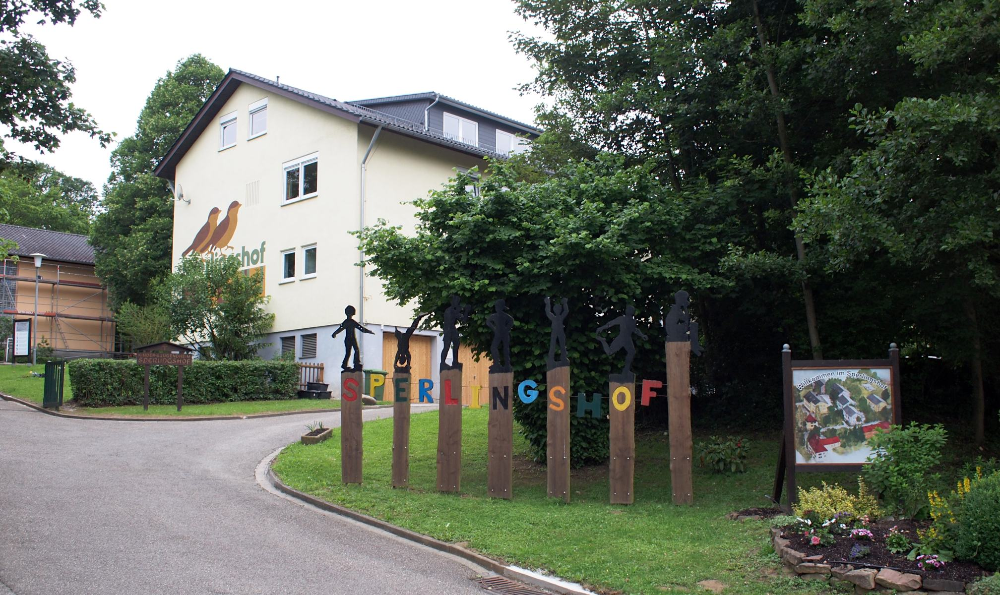 Kinder- und Jugendheim Sperlingshof bei Wilferdingen